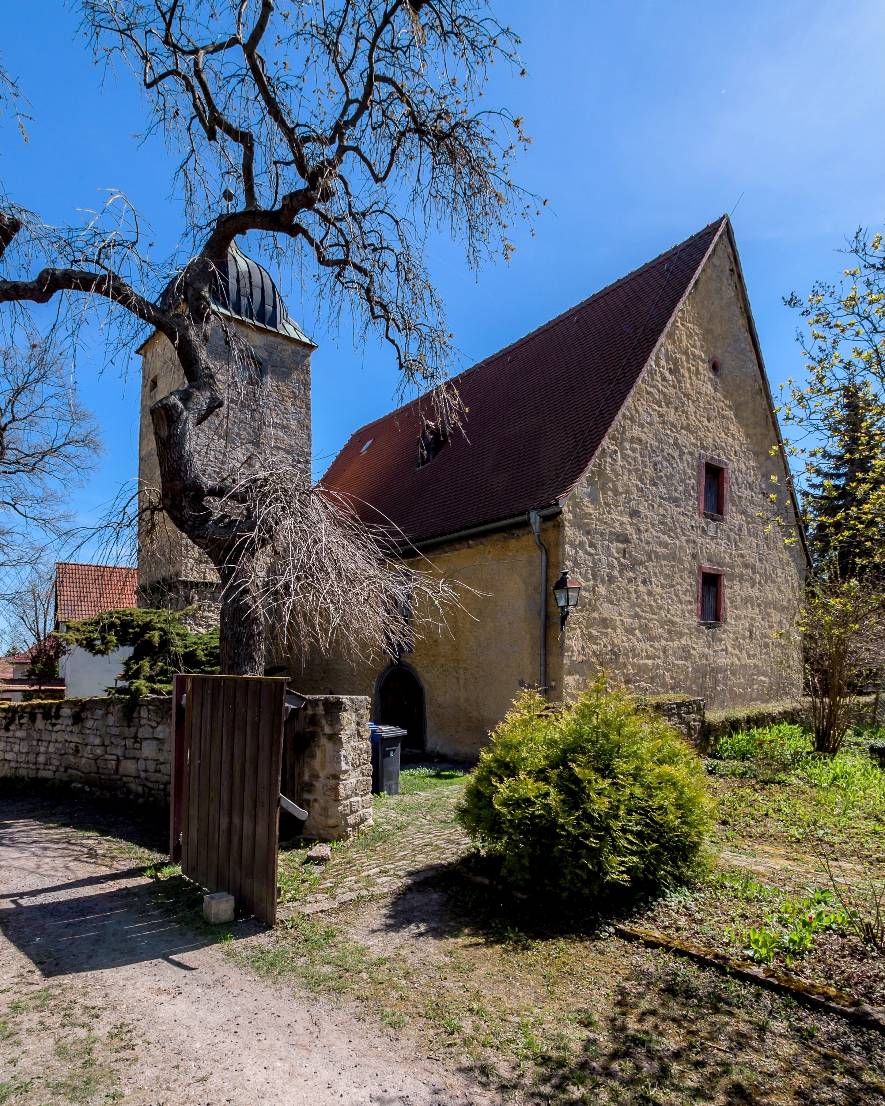 Niedersynderstedt Dorfkirche